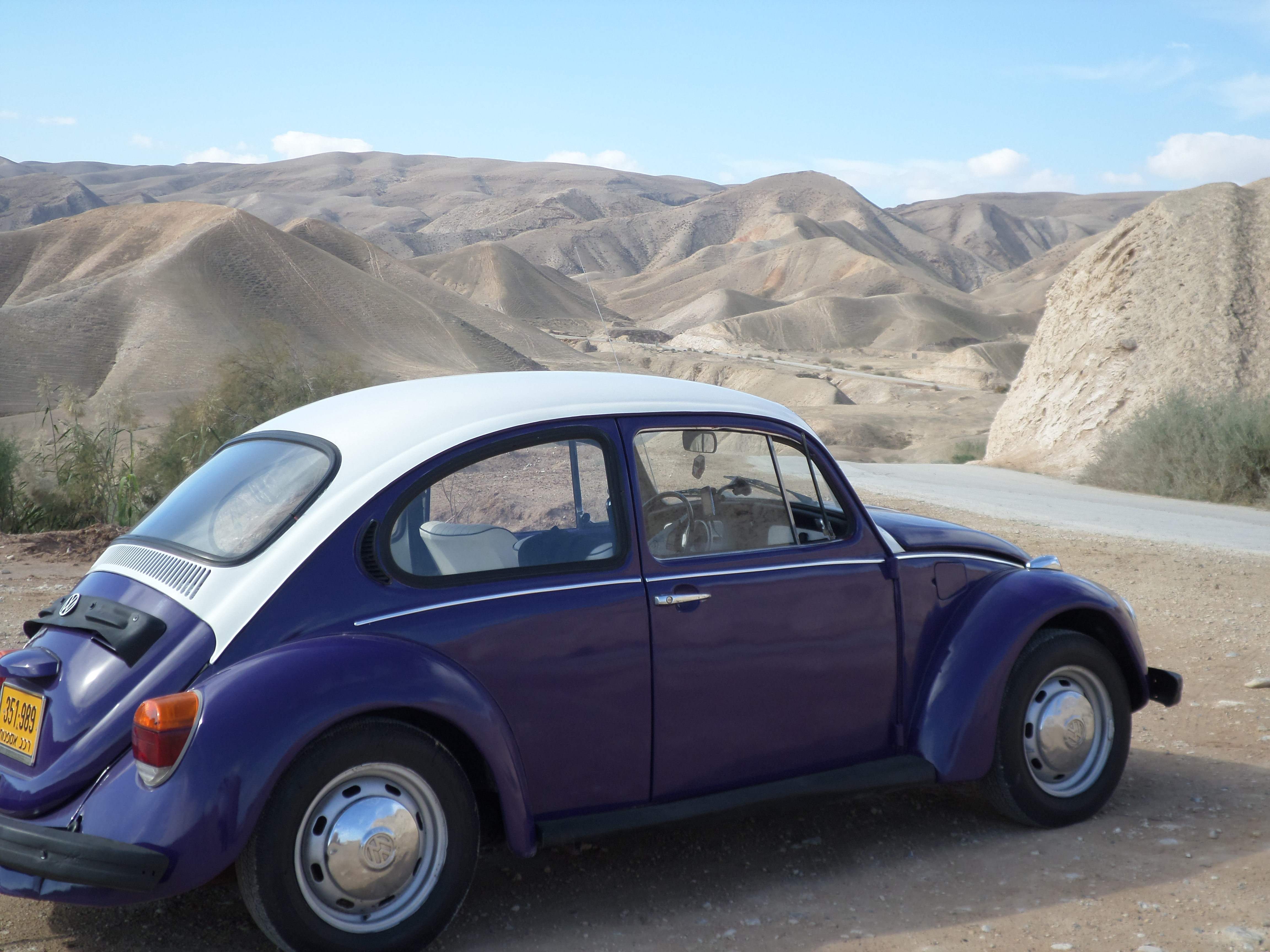 רכב אספנות הנפוץ ביותר בישראל